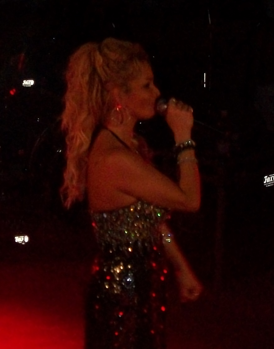 Concierto Ciudad Victoria, Tamps.